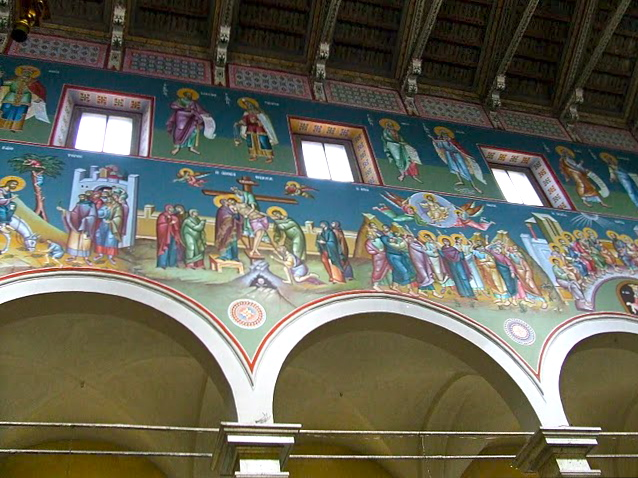 Affreschi in stile bizantino, raffiguranti da sinistra a destra: l'ingresso di Gesù in Gerusalemme, la Crocifissione, la Resurrezione, la Pentecoste.